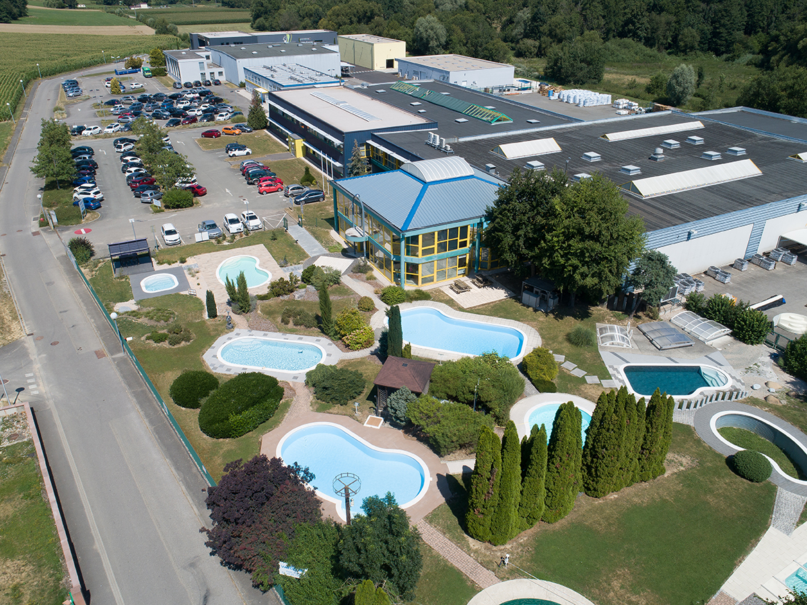 Vue drone de la société Piscines Waterair en 2018 à SEPPOIS-LE-BAS